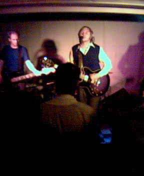 Mattias Alkberg BD